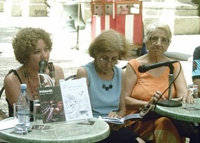 MaríaELL6